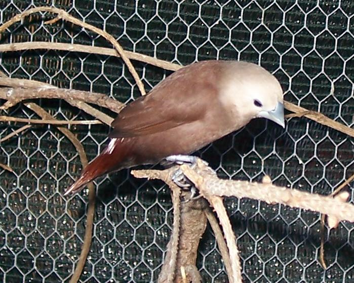 L. maja